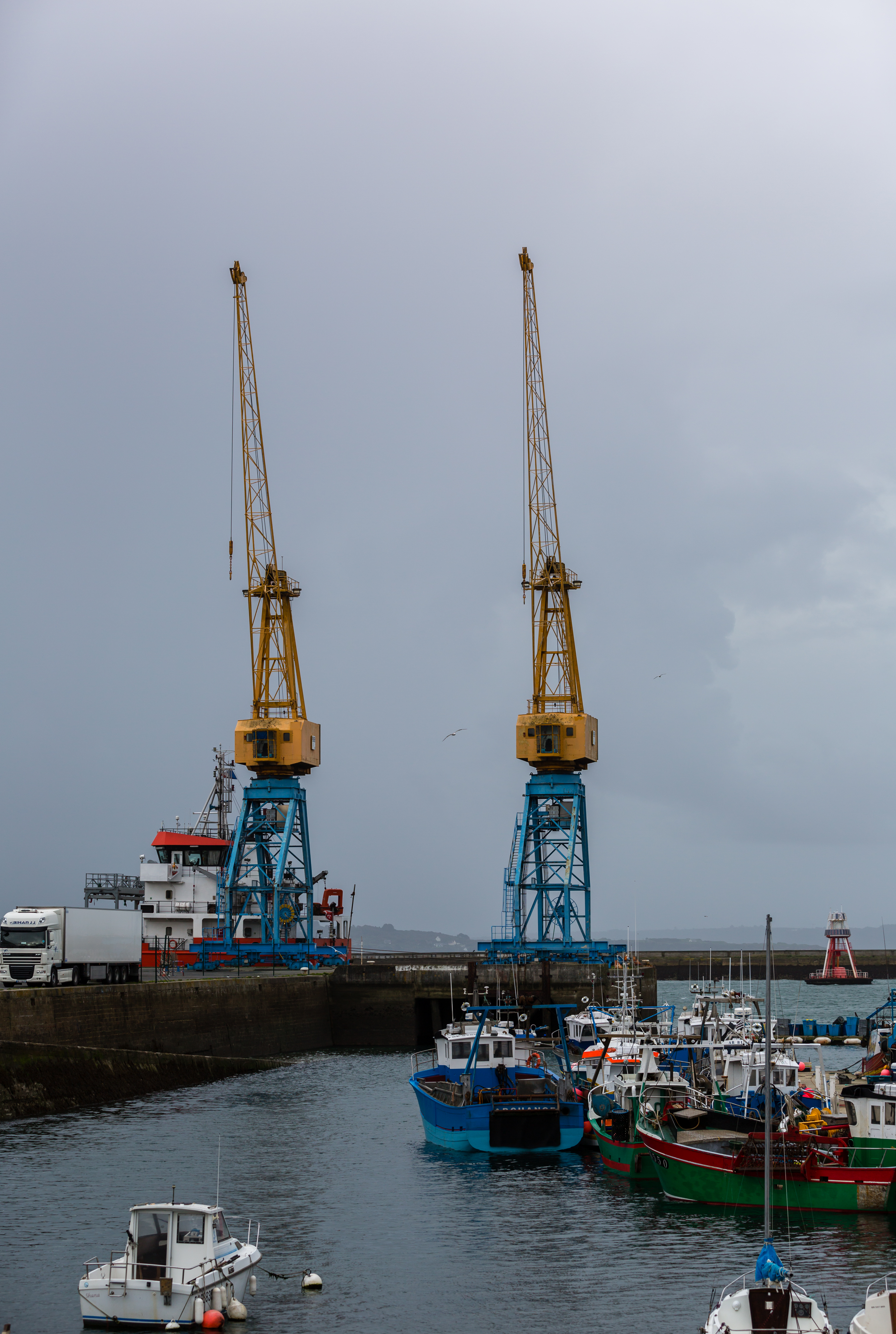 Le port de commerce de Brest (France).